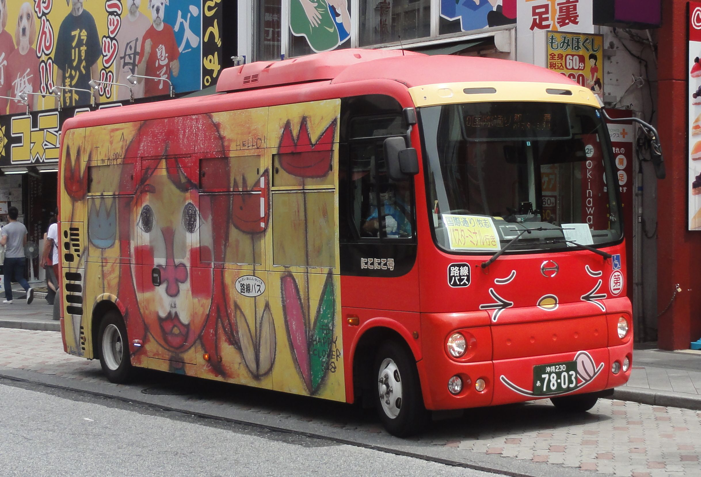 那覇バス にこにこ号